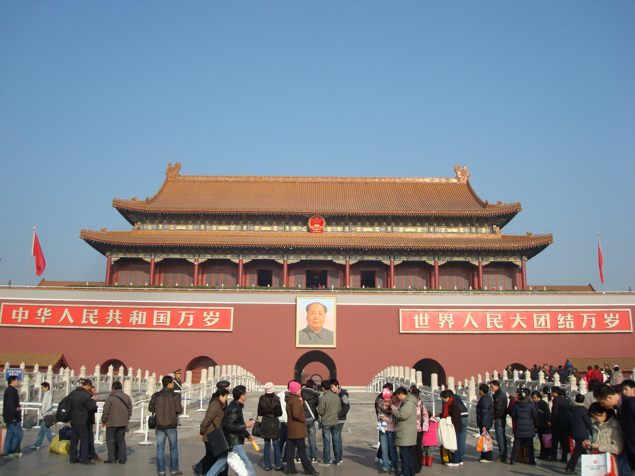 天安门